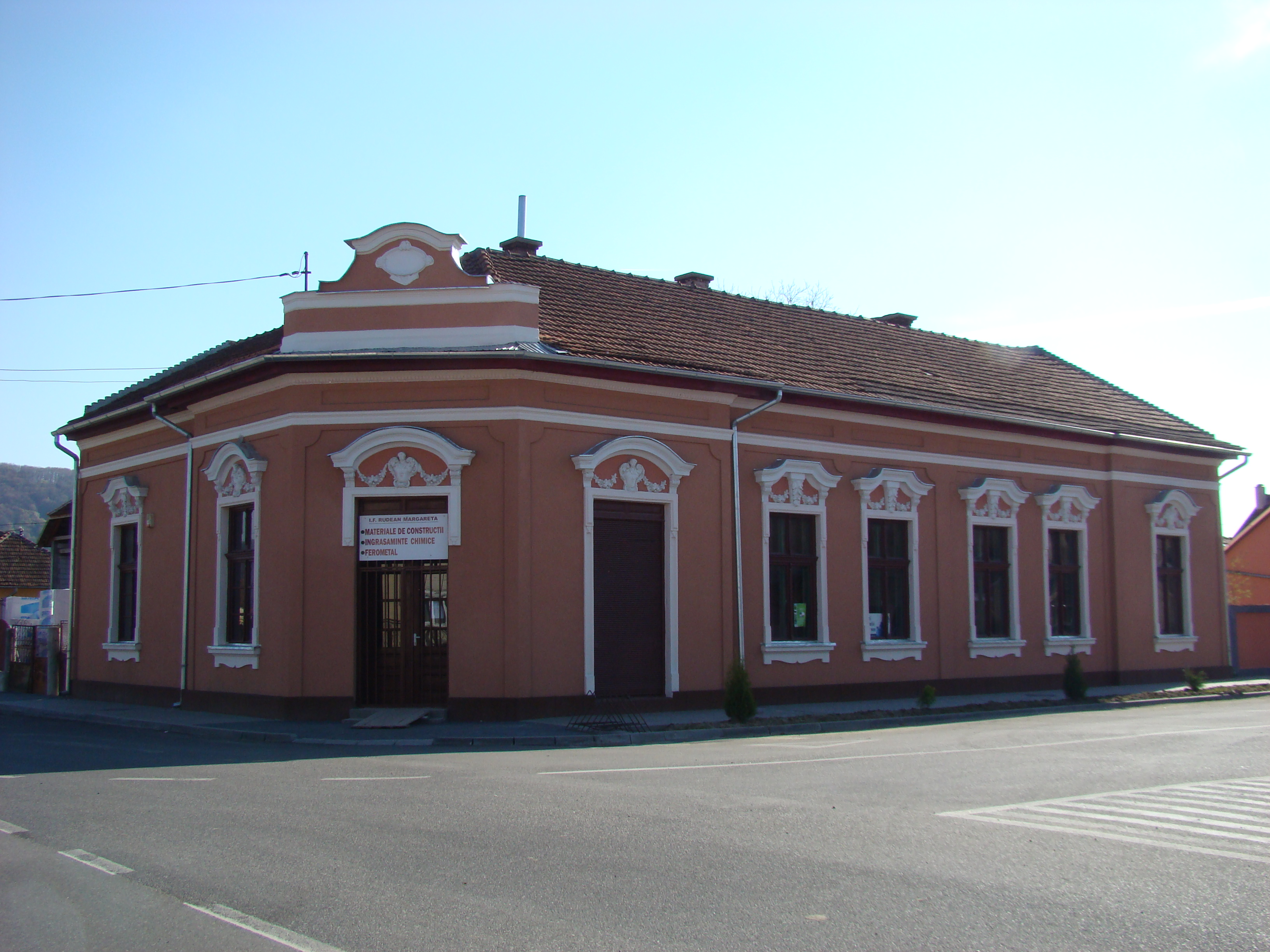 Biblioteca comunală, azi locuinţă şi spaţiu comercial